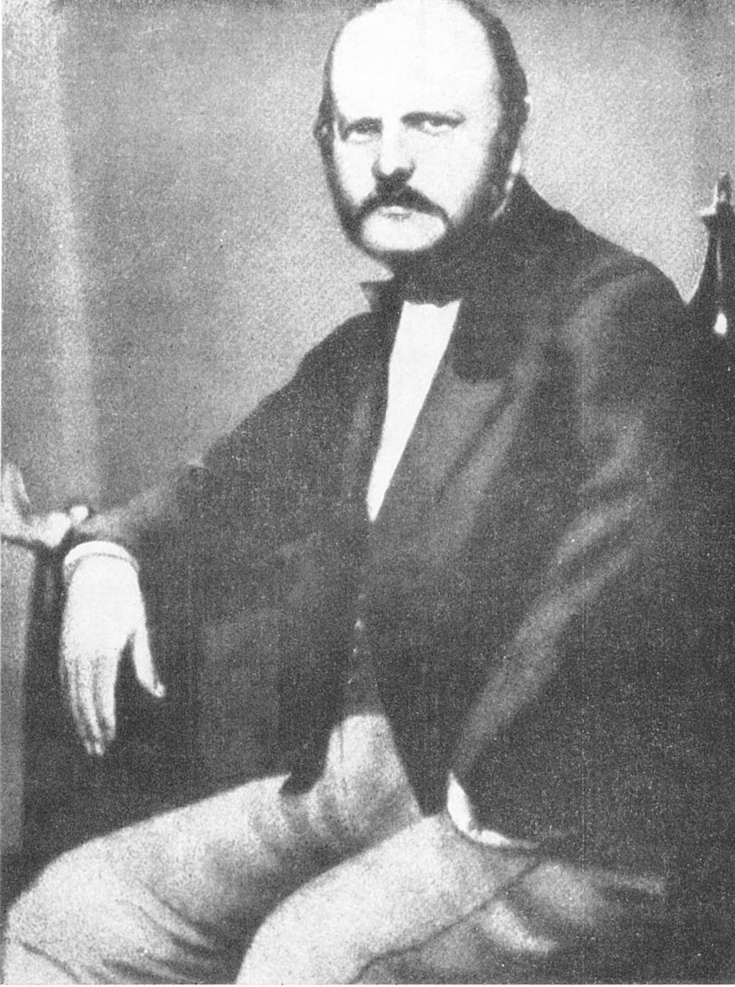 Ignaz Semmelweis 1858